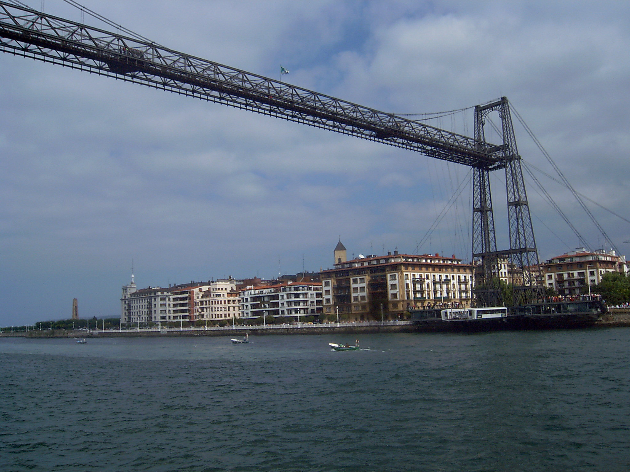 Bizkaia zubia